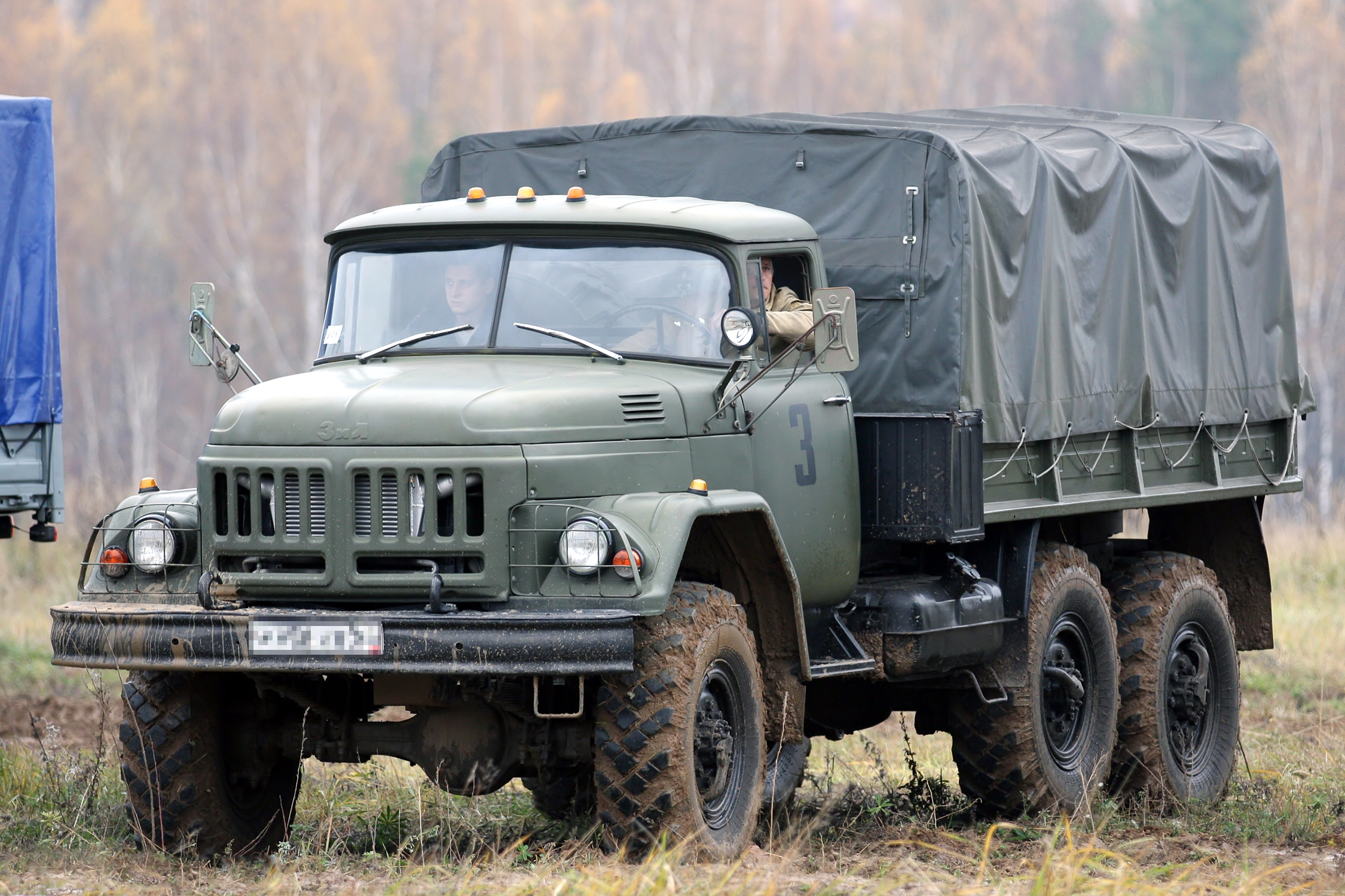 ЗИЛ-131 (ZIL-131)